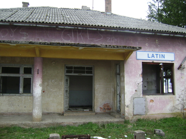 Stajalište Latin na Ličkoj pruzi